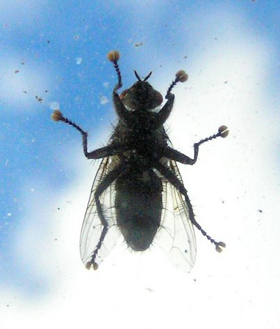 Ujęcie od dołu n/n muchówki. Widoczne nogi z przyssawkami. Autor: Maciej Dembiniok